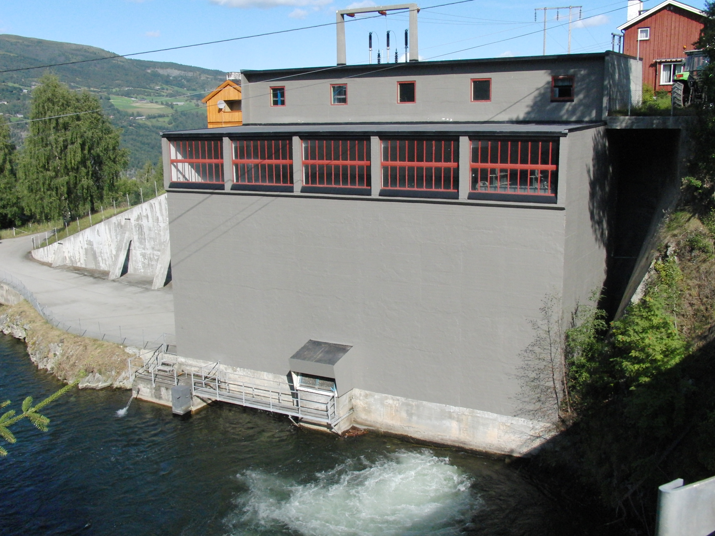 Midtre Tessa kraftverk